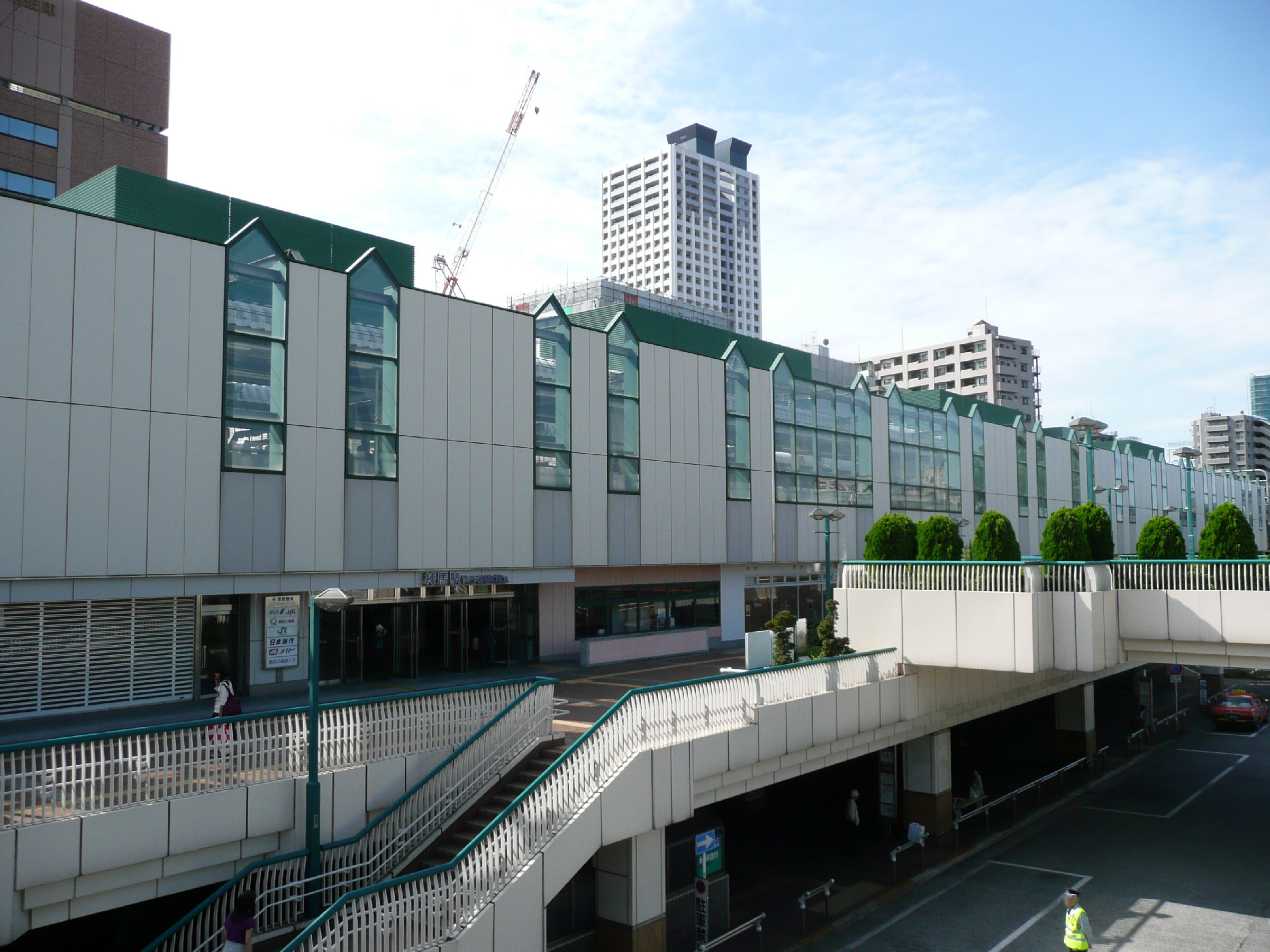 練馬駅北口